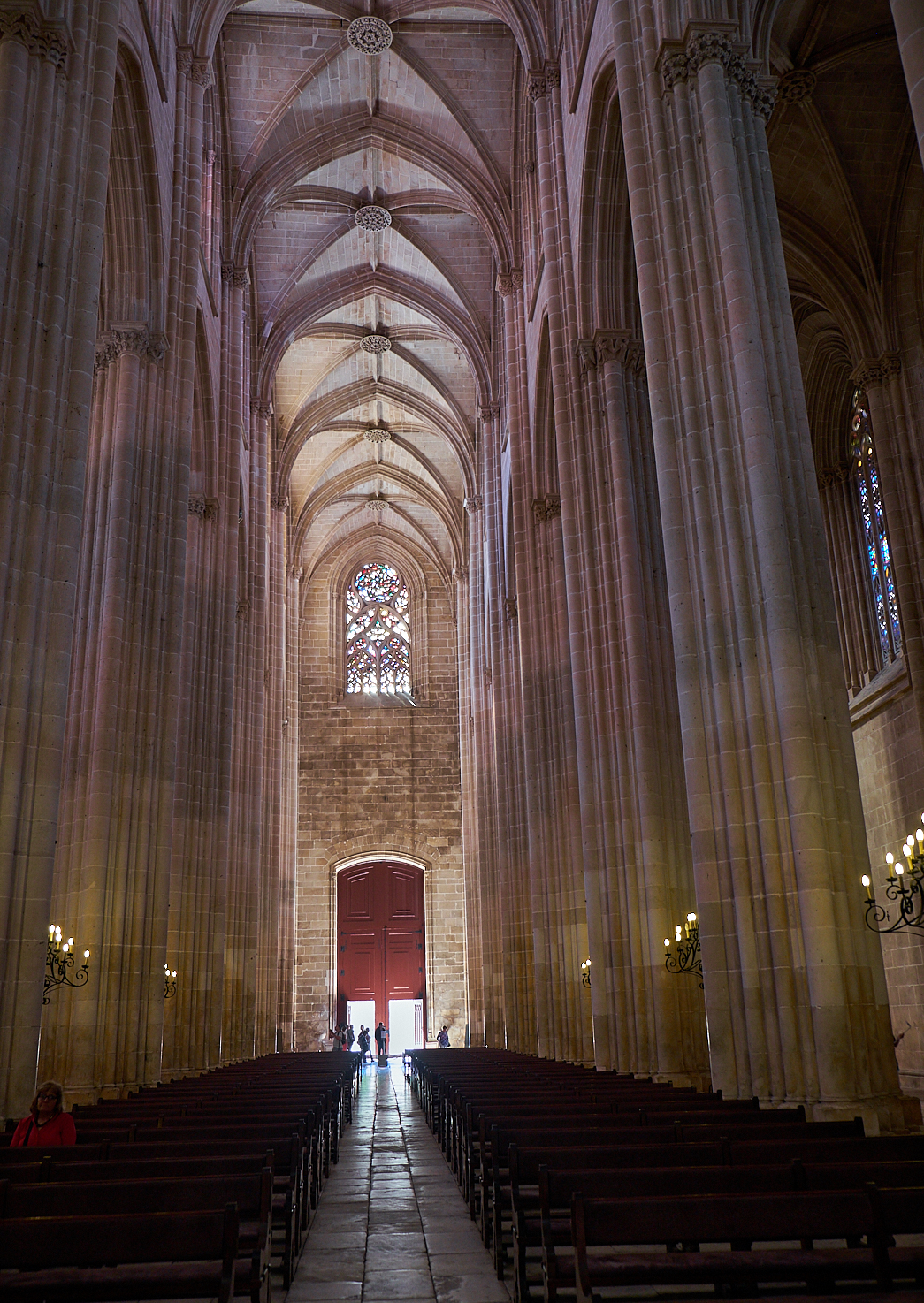 Batalha, Portugal